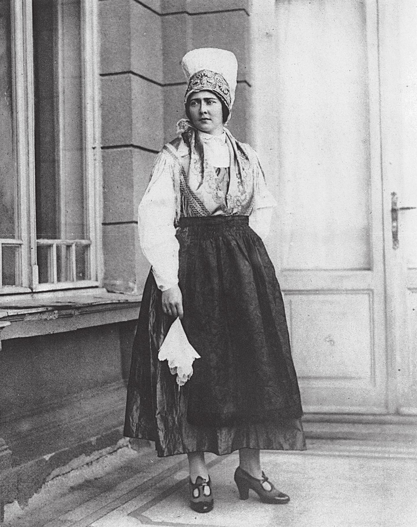 Kraljica Marija v slovenski narodni noši